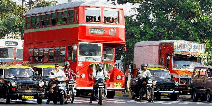 Mumbai traffic